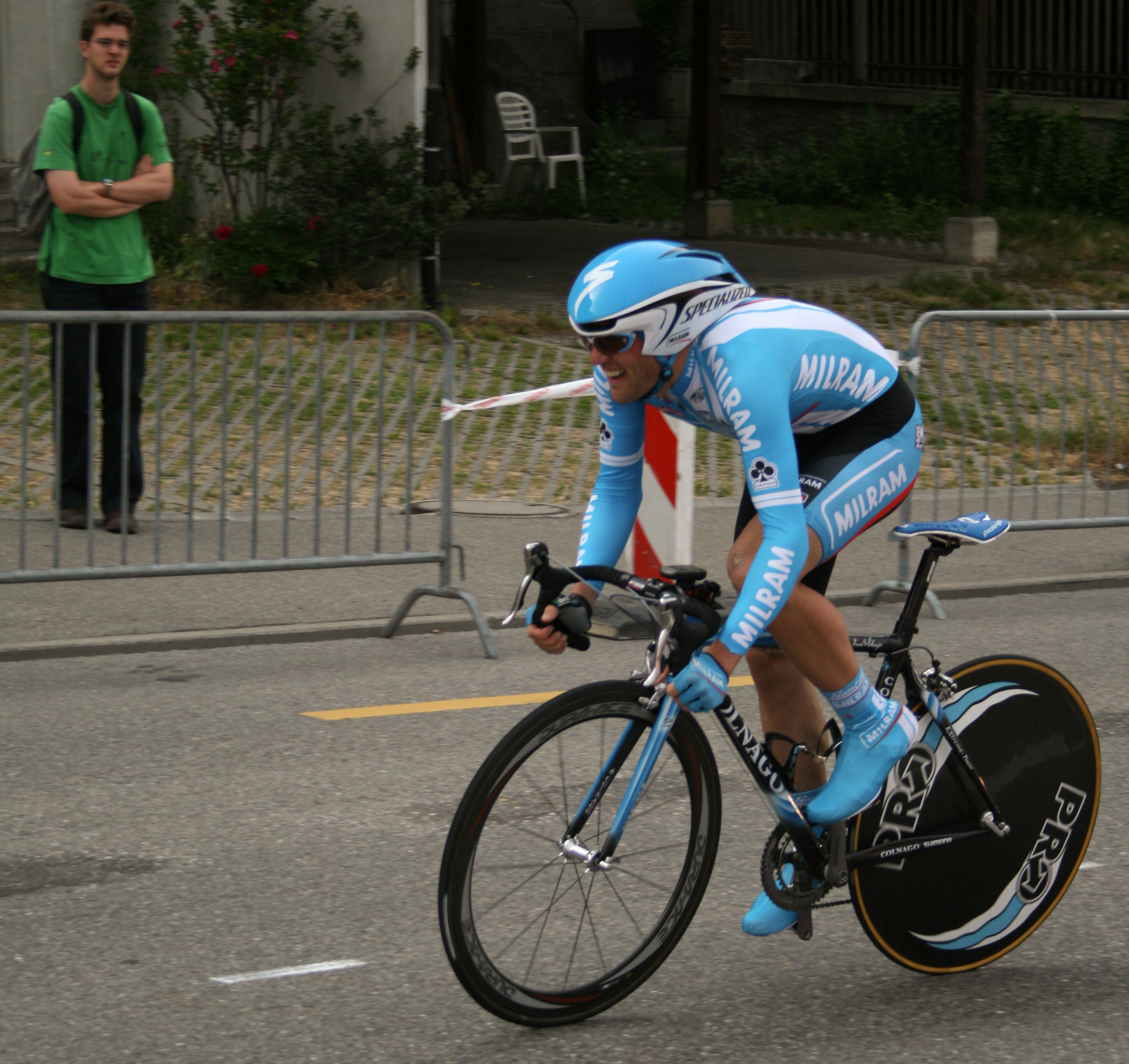 Mirco Lorenzetto prologue du Tour de Romandie 2007